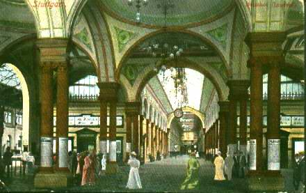 Centralbahnhof Stuttgart, Innenansicht der Bahnhofshalle